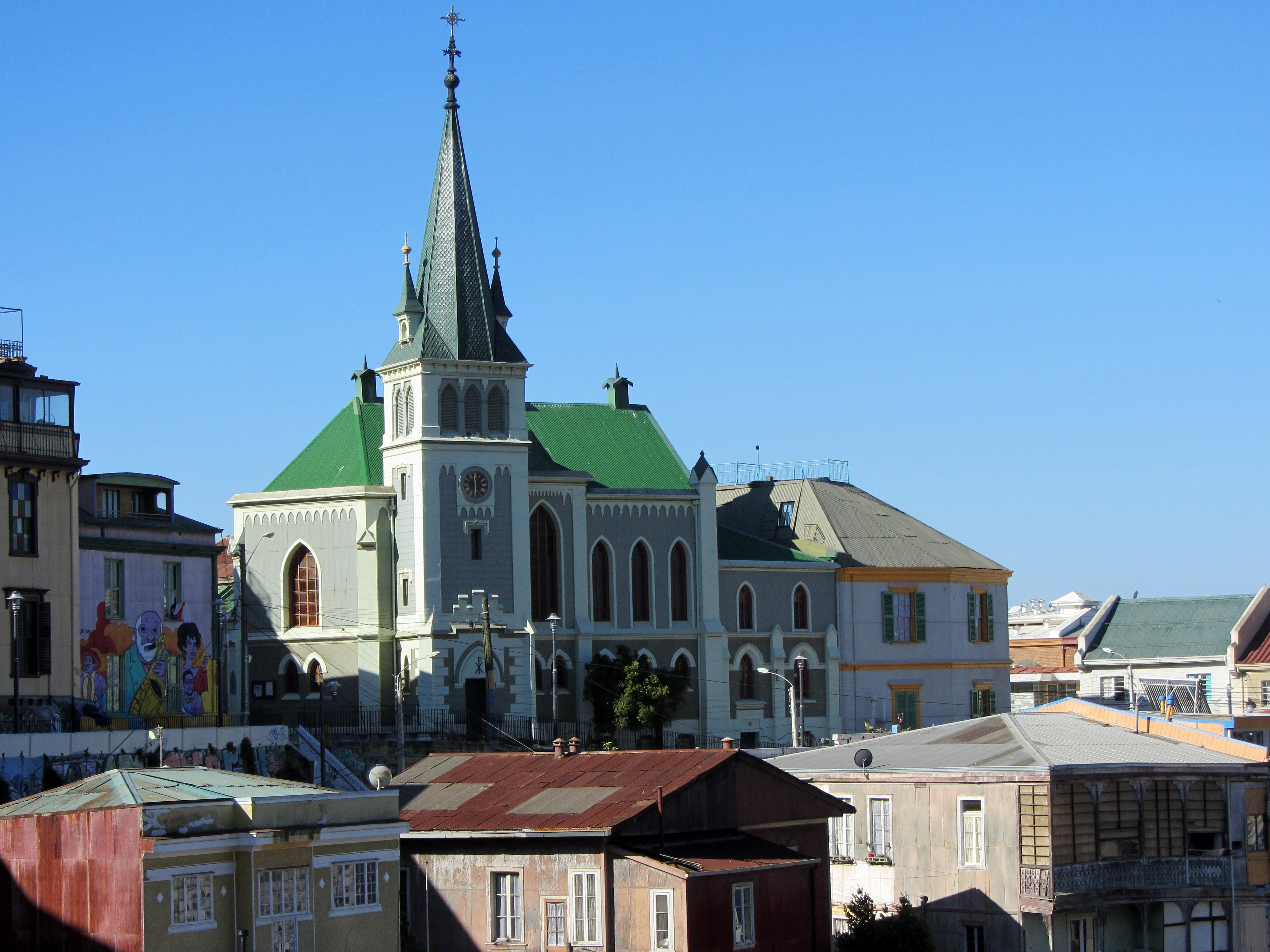 La Iglesia luterana de Valparaíso fotografiada desde la salida de la estación alta del ascensor Reina Victoria, paseo Dimalow, sobre la plazoleta Lukas.